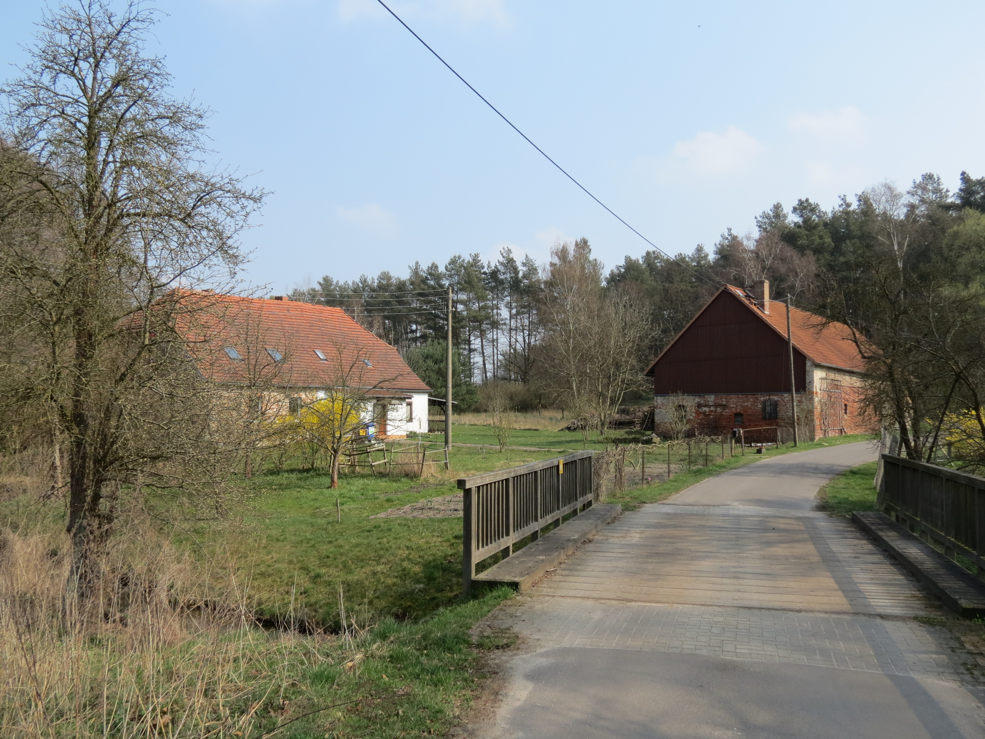 Baroldmühle, Wohnplatz im Ortsteil Doberburg der Stadt Lieberose, Lkr. Dahme-Spreewald, Brandenburg, Deutschland, östlicher Teil des Wohnplatzes, Blick von Westen nach Osten, links das Mühlengebäude von 1841